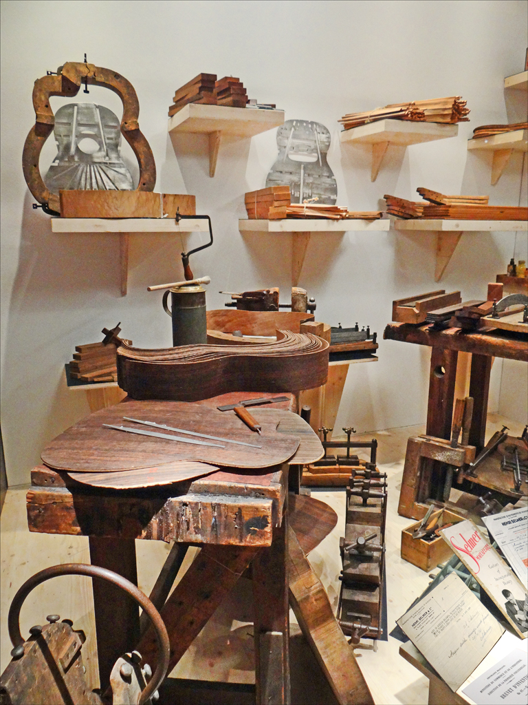 Reconstitution de l'atelier de fabrication de guitares Selmer-Maccaferri (1933) Mario Maccaferri (1900-1993), luthier italien, a conçu de nombreuses guitares pour Selmer jusqu'en 1933 dont la célèbre guitare de jazz de Django Reinhardt. Musée de la musique, présentation dans le cadre de l'exposition Django Reinhardt Les pièces détachées, lots de bois et systèmes de fabrication provenant de l'atelier Selmer-Maccaferri ont été achetés par le musée des musiques populaires de Montluçon en 1998. Par contre, l'outillage à main présenté dans la vitrine provient d'autres ateliers (Françaix et La Harpe Royale-Martin). Le jazz manouche est à l'honneur au musée de la musique avec l'exposition "Django Reinhardt, swing de Paris". La vie et l’œuvre du célèbre guitariste y sont présentées avec de nombreux détails dans une exposition très bien documentée. Son seul défaut est de disposer d'un espace insuffisant pour la masse d'informations qui ont été rassemblées à cette occasion. Peut-être n'était-ce pas nécessaire de mettre autant de partitions, pochettes de disques, lettres et photos souvent semblables qui n'apportent pas toujours une grande valeur ajoutée ? Les dispositifs sonores sont simples et bien conçus, on peut y attendre de nombreux disques. Par contre les films ne sont pas toujours bien diffusés. Ainsi, une curieuse boite en bois totalement fermée, pourvue d'un écran sur un coté et percée de trous impose de passer la tête dans les orifices pour voir le film. C'est un dispositif curieux et inefficace qui n'a pas sa place dans une exposition de ce type. La salle audiovisuelle offre des conditions de confort plus habituelles et propose un film de 1957 de Paul Paviot en hommage à Django, commenté par Yves Montand et tourné après sa mort en 1953 à Samois. En bref, l'exposition mérite une visite surtout pour les amateurs de jazz même si la scénographie aurait pu être plus réussie.